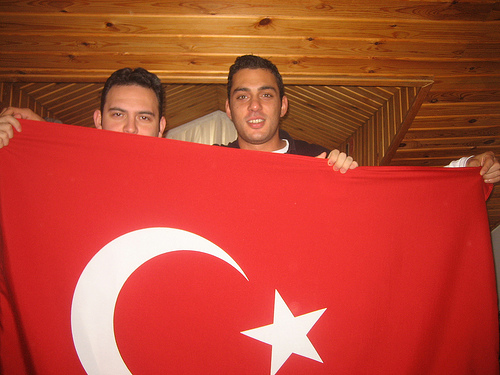 Immagine di due tifosi nella partita tra Besiktas e Liverpool